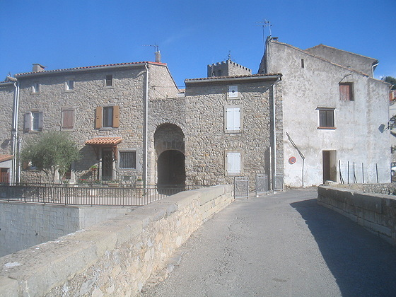 Vue de Ribaute